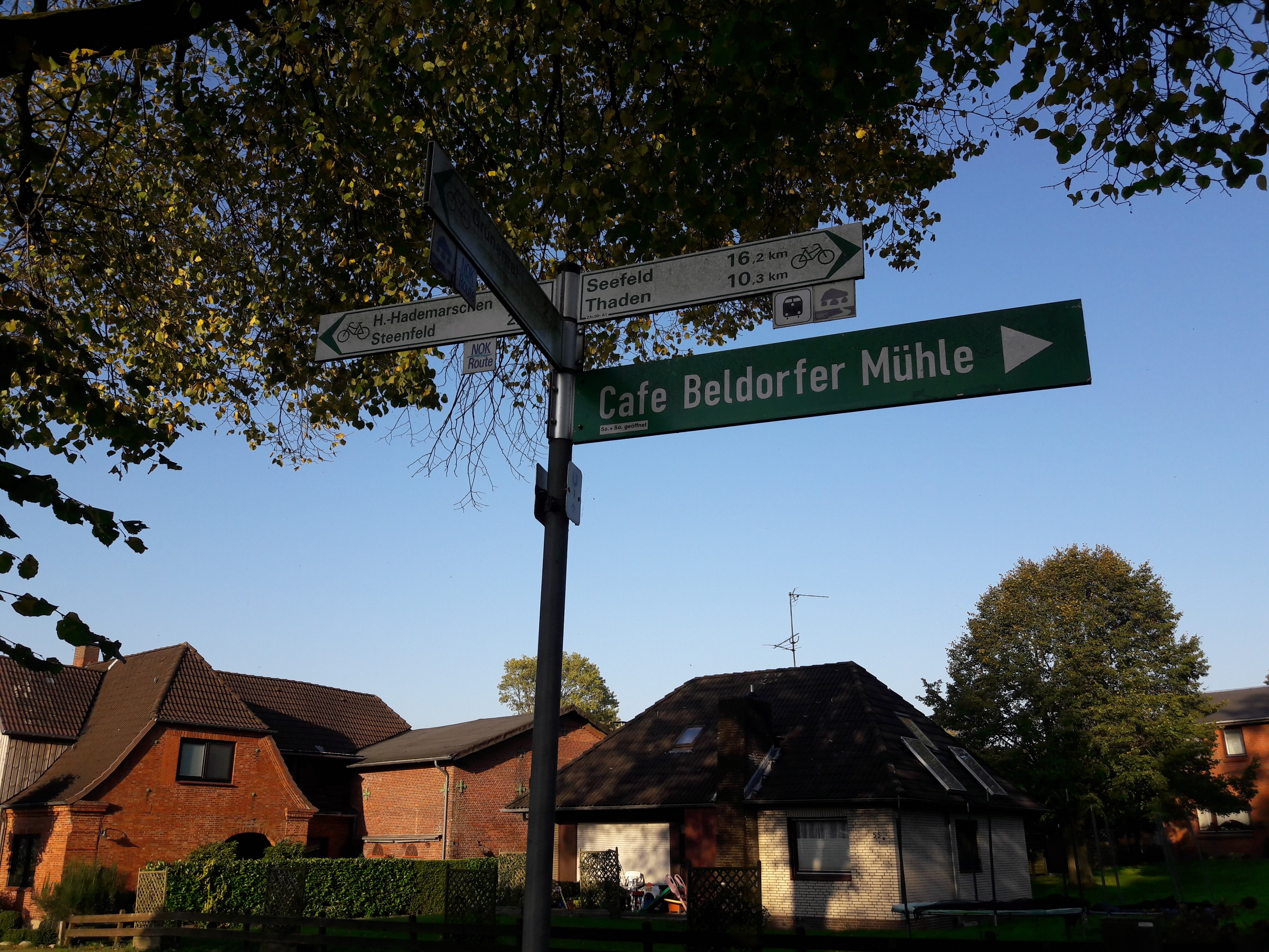 Beldorf